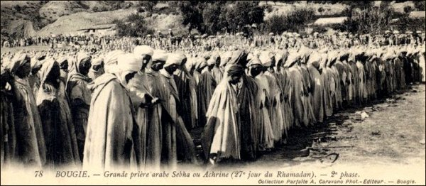 Grande prière du 27eme jour (Seb'a ou 'achrine) du ramadan à Béjaïa